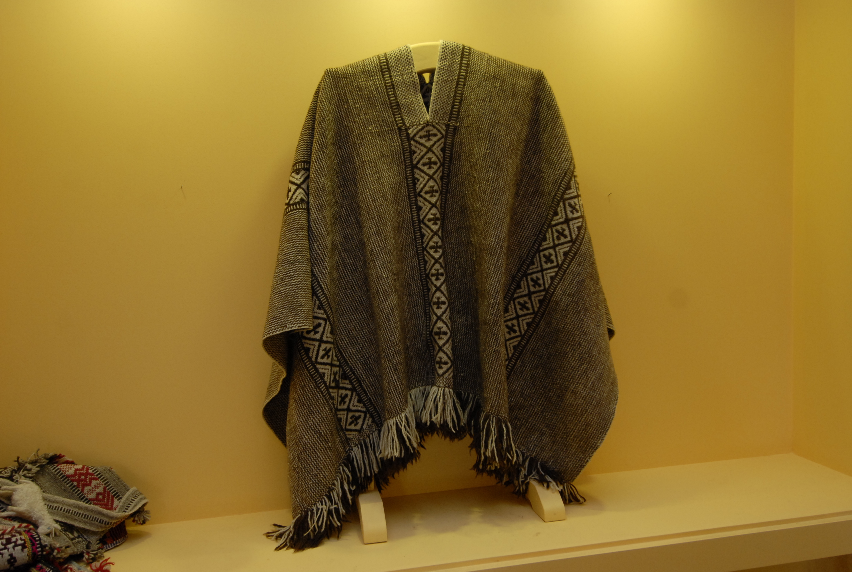 Inauguran el el “Museo Artesanía Chilena”. Manta Mapuche